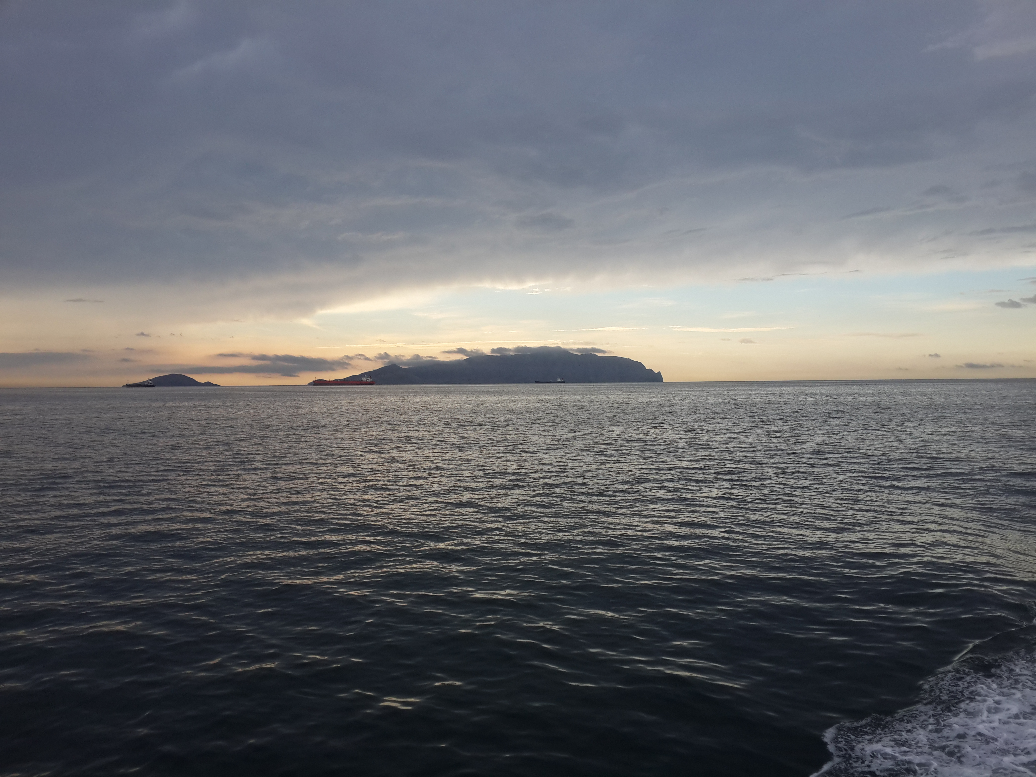 Aquí pueden apreciar Isla Borracha, que aparece en algunas cartas nauticas como Cayo Borracha. Un magnifico lugar para la pesca deportiva.